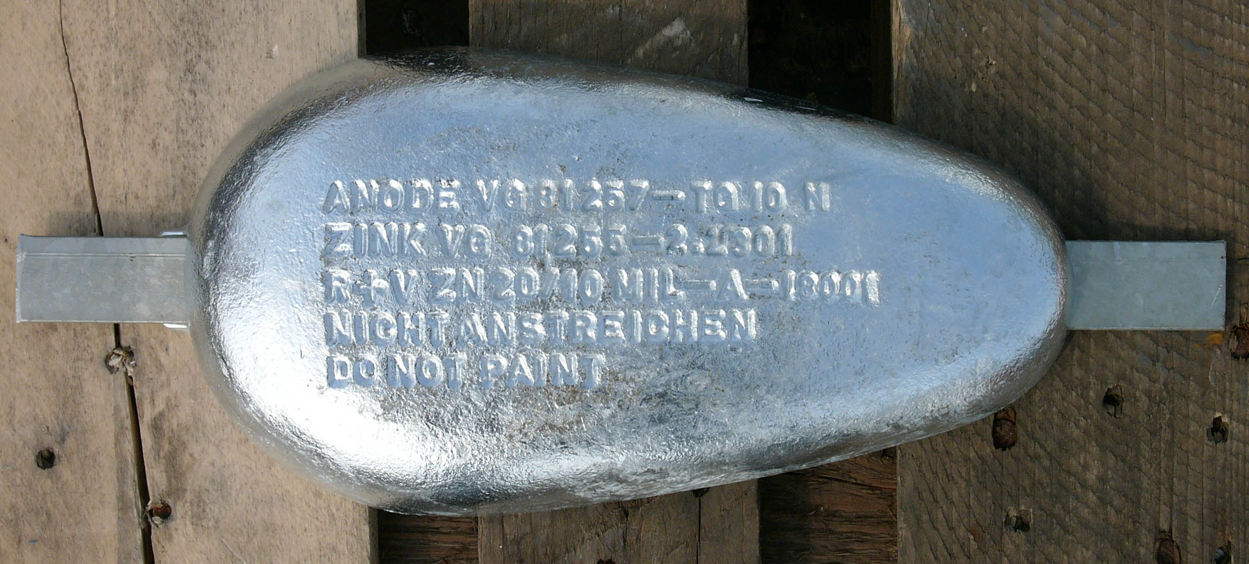 Galvanic anode